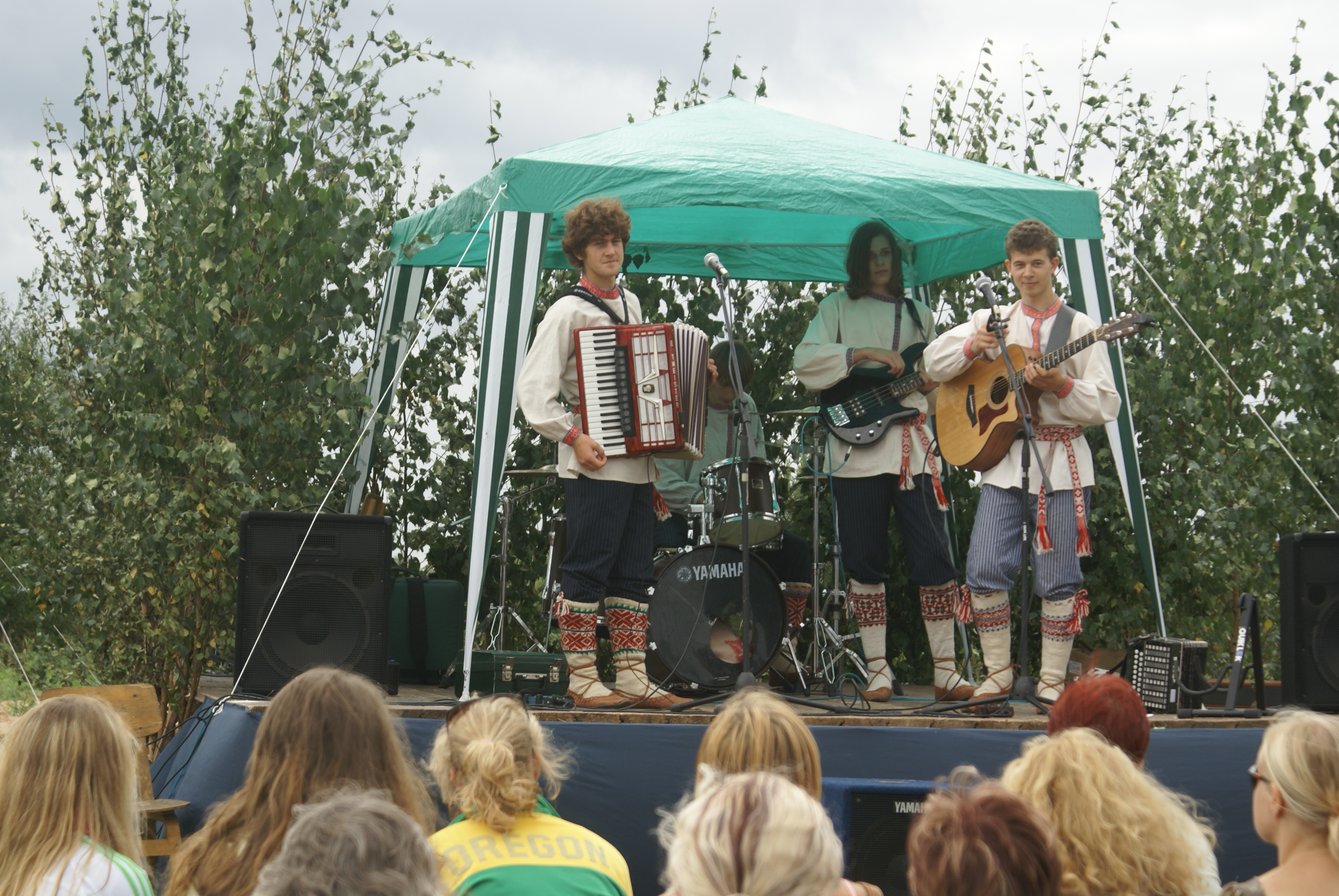 Eesti ansambel Zetod